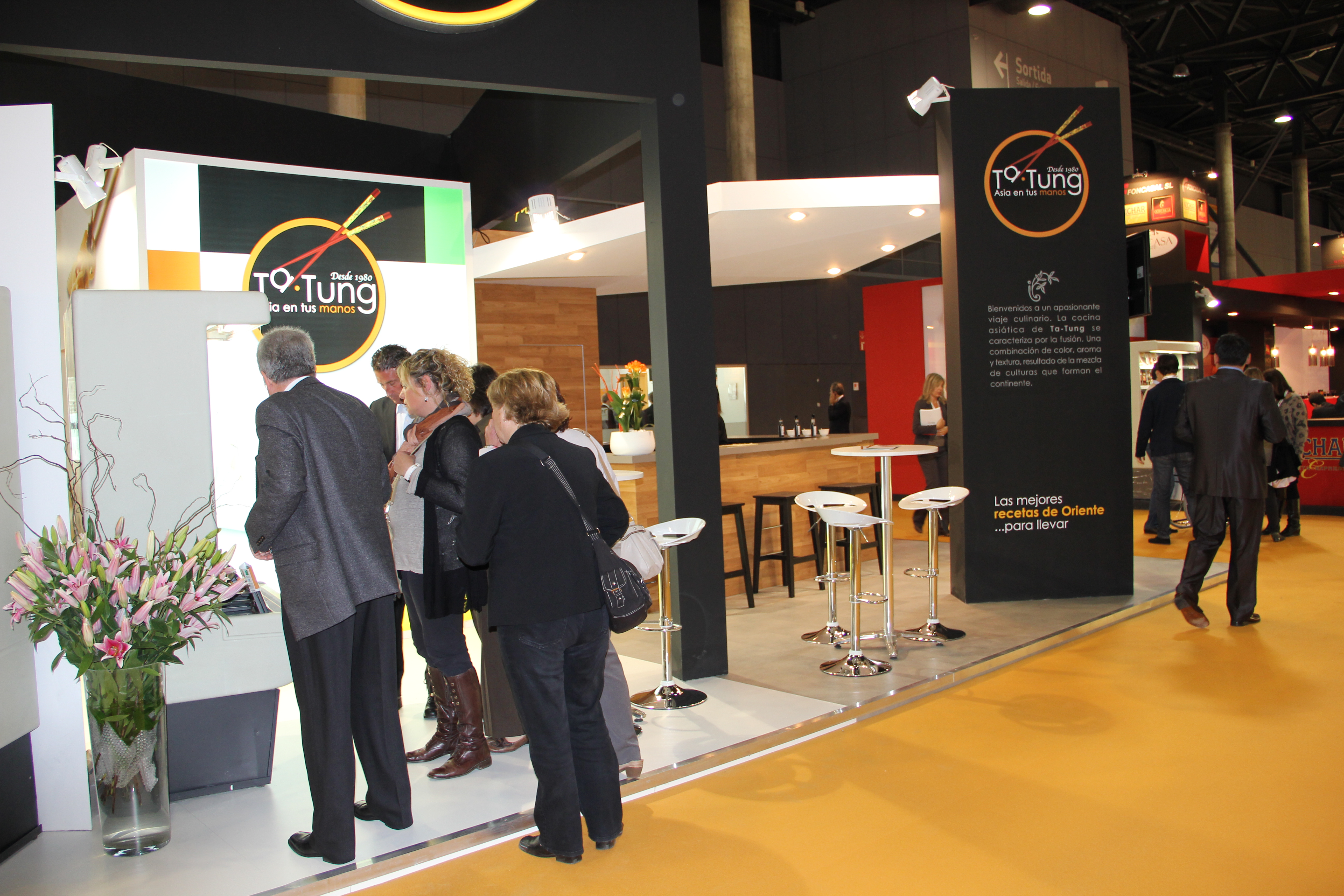 Ta-Tung en Alimentaria 2011.